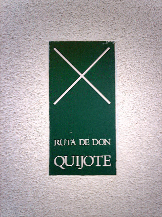 Señalizador de la Ruta de Don Quijote